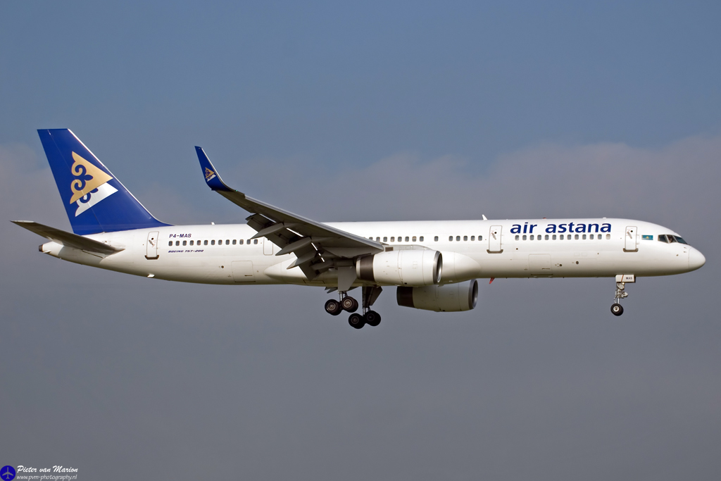 Boeing 757-28A Amsterdam schiphol [AMS / EHAM] 30-06-2009